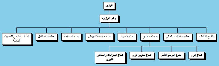 صورة لهيكل تنظيمي لوزارة الموارد المائية، من عملي الخاص.